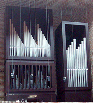 Ravnsbjergkirken - orglet, Ravnsbjerg Sogn, Århus, Denmark